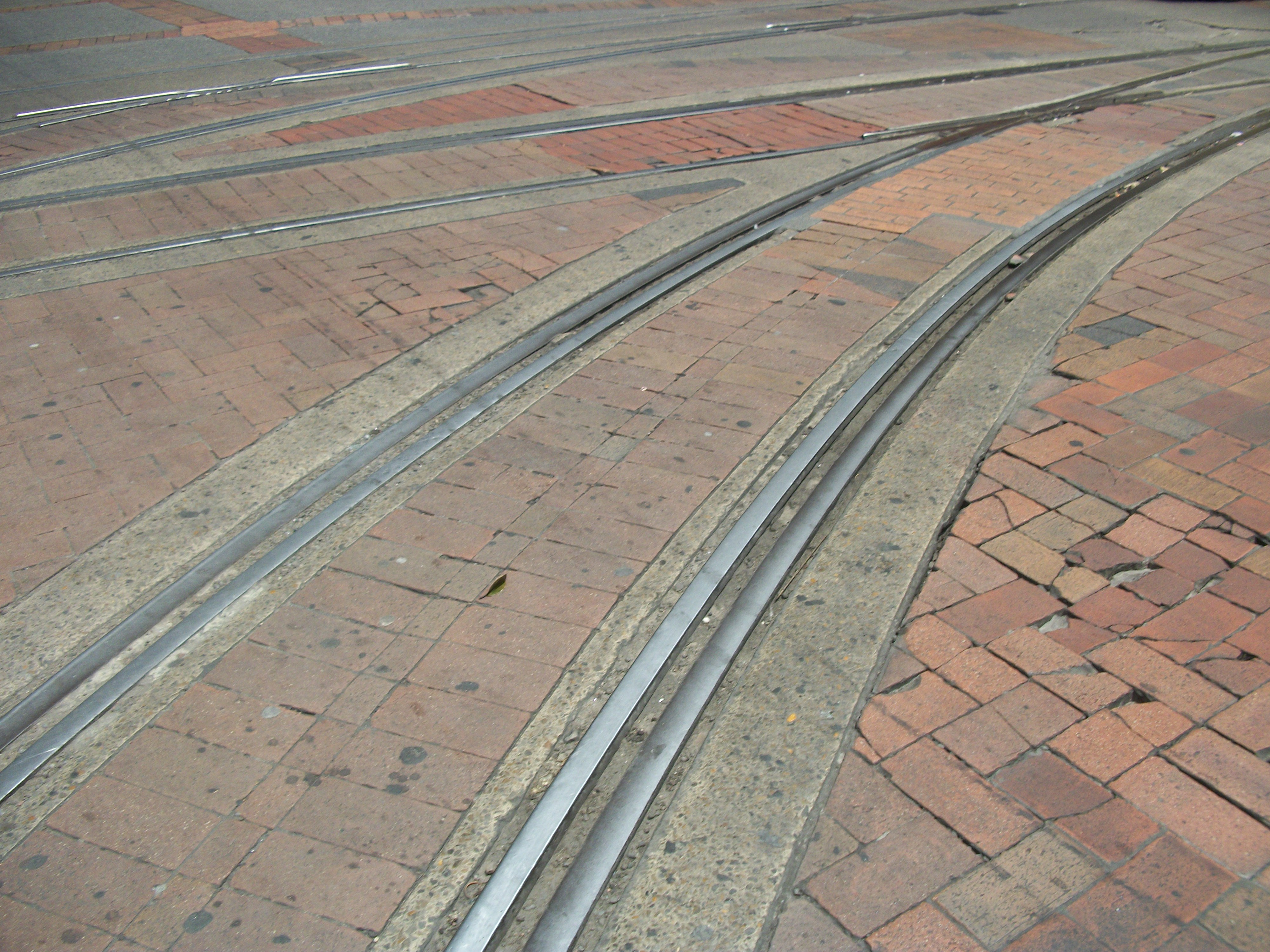 Vestigios del tranvía de Bogotá en el Eje Ambiental con carrera Séptima.